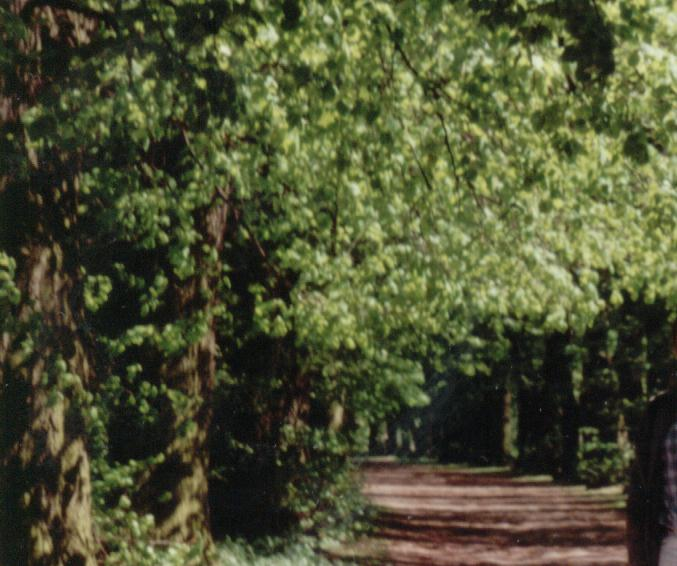 Aleja parkowa w dawnym parku dworskim Nowym Dworze